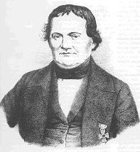 Carl Samuel Haeusler (geboren 6. November 1787, gestorben 13. Dezember 1853) Begründer der deutschen Schaumweinherstellung